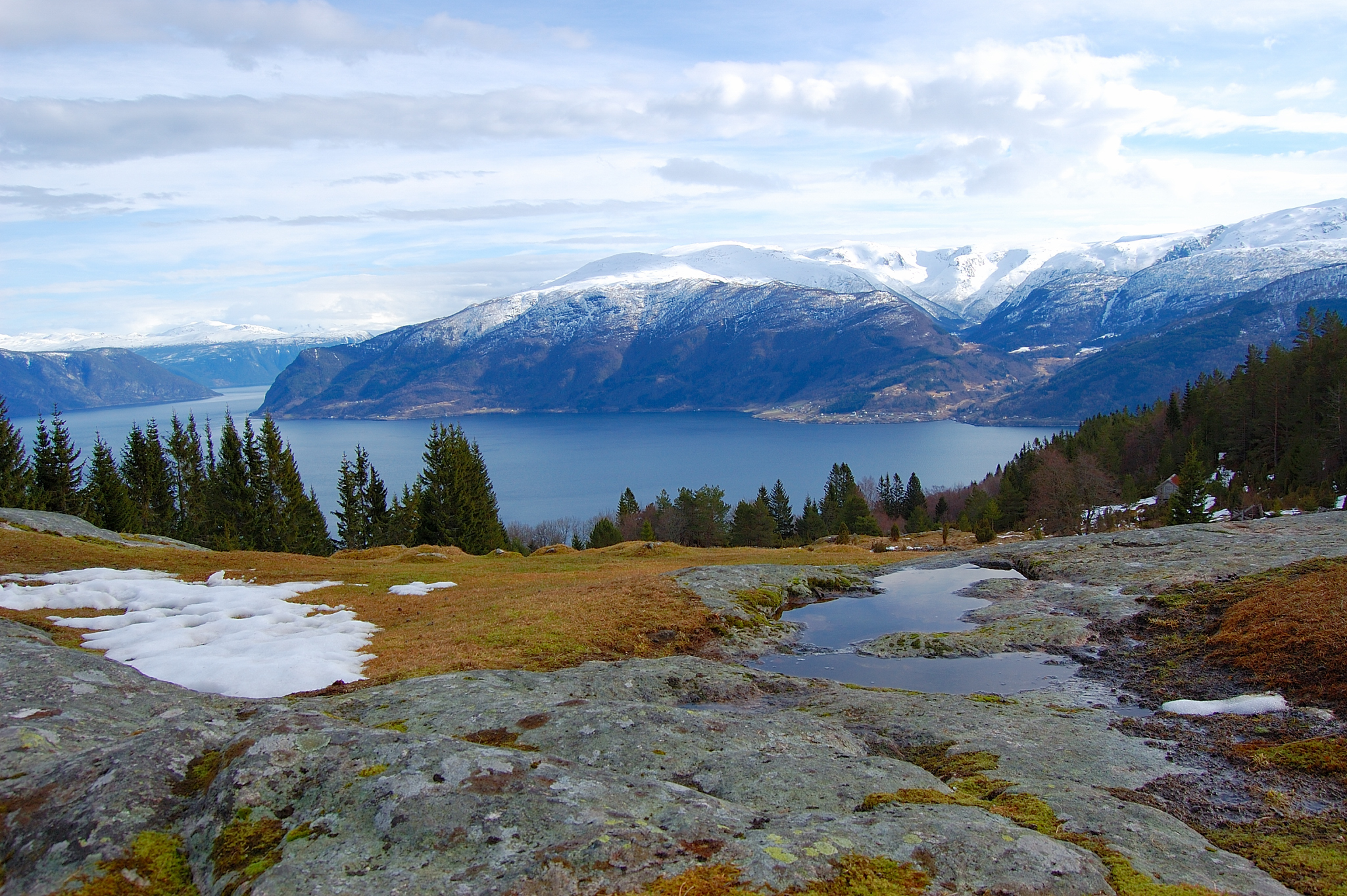 Feios ved Sognefjorden. Biletet er teke frå Leikanger.